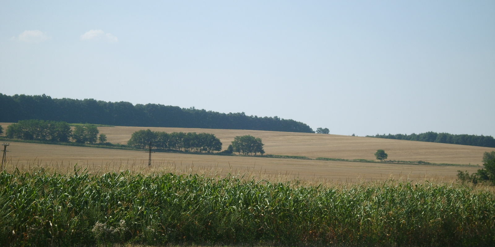 Tipikus dombsági táj, előtérben kukoricafölddel. Pölöske határában készült a kép 2007. július 20-án készült.